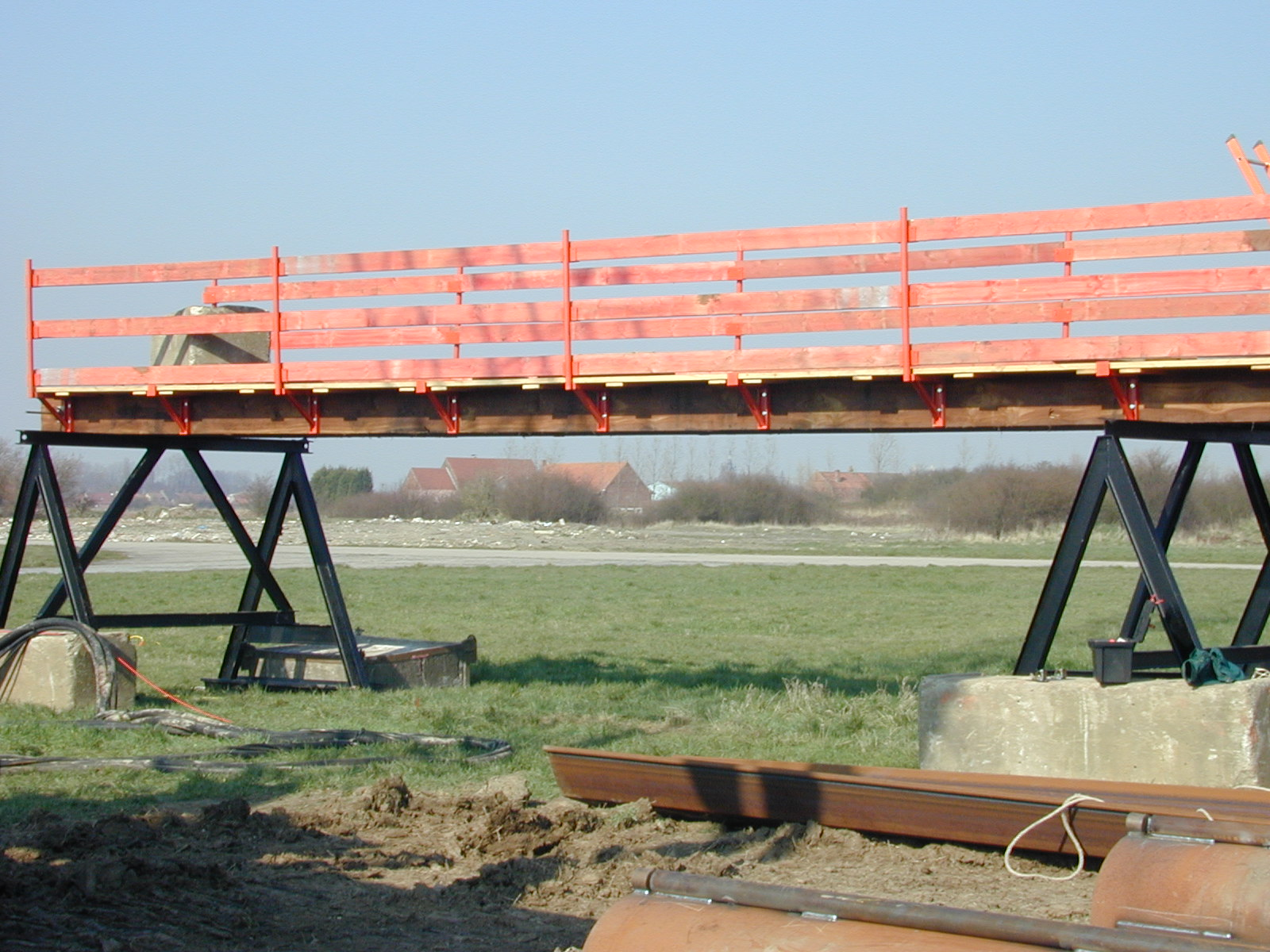 guide de battage pendant les essais de merville (PN Vibrofonçage)